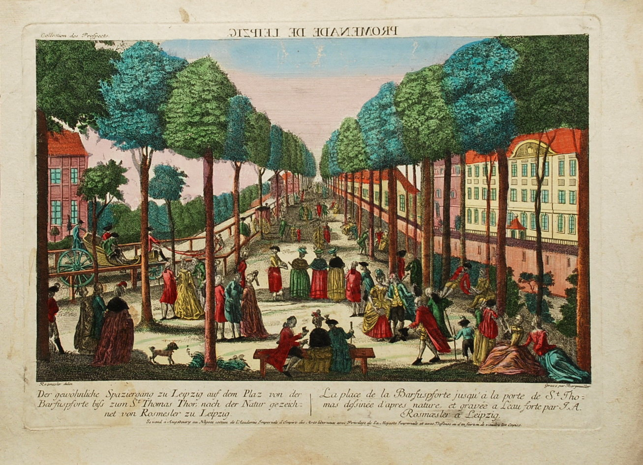 Die Esplanade in der Peters Vorstadt zu Leipzig um 1780 Altkolorierter Kupferstich 29,2 x 41,3 cm Plattenrand (Guckkastenblatt mit Titel in Spiegelschrift über der Darstellung. Auch die Darstellung ist seitenverkehrt.). Gestochen von Johann Baptist Bergmüller (1724 - 1785; THIEME-BECKER Bd. 3, S. 411) nach einer Zeichnung von Johann August Rosmäßler (1752 - 1783; THIEME-BECKER Bd. 29, S. 77)